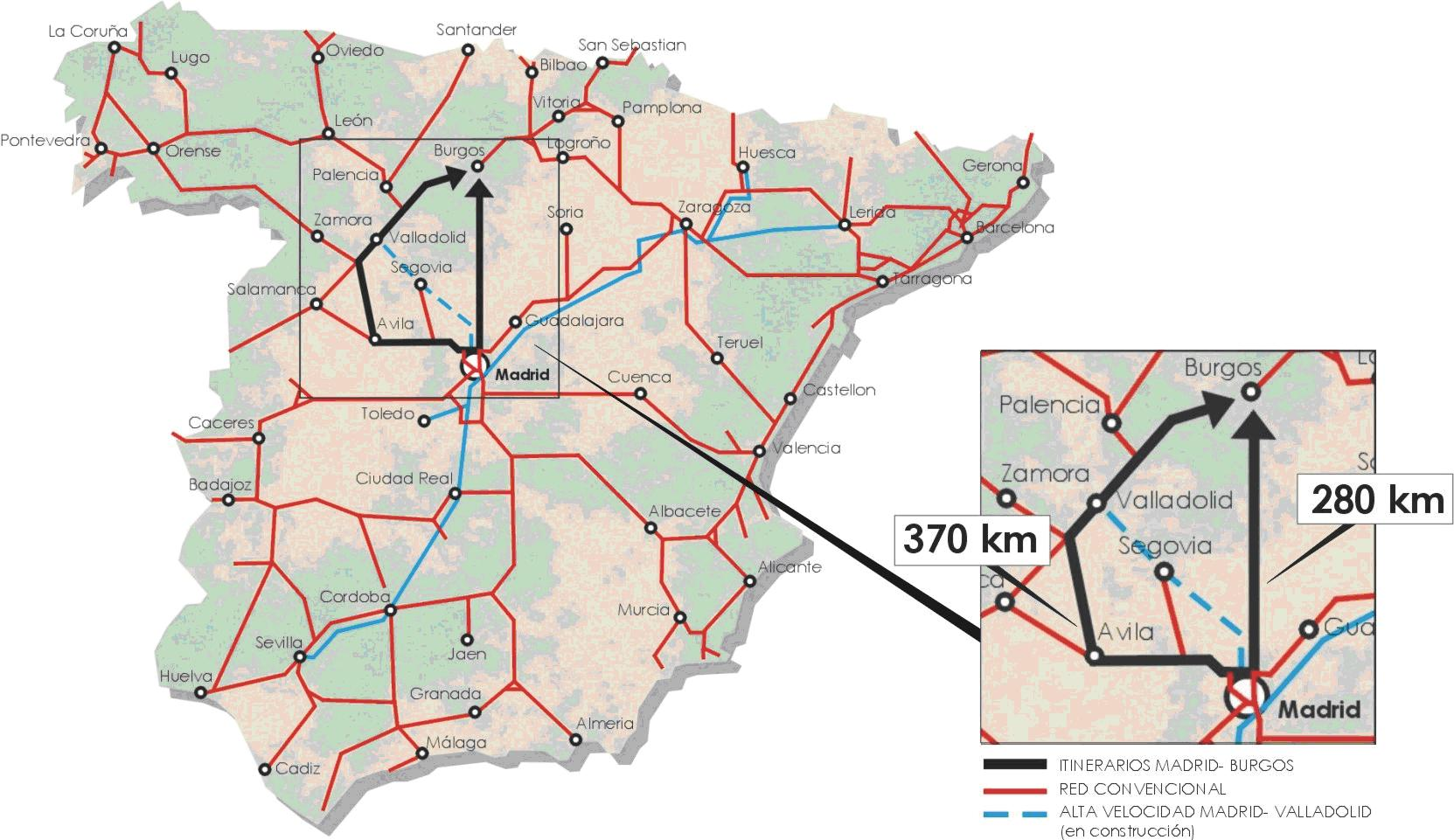 El ferrocarril directo Madrid - Burgos como trazado alternativo para la Alta Velocidad